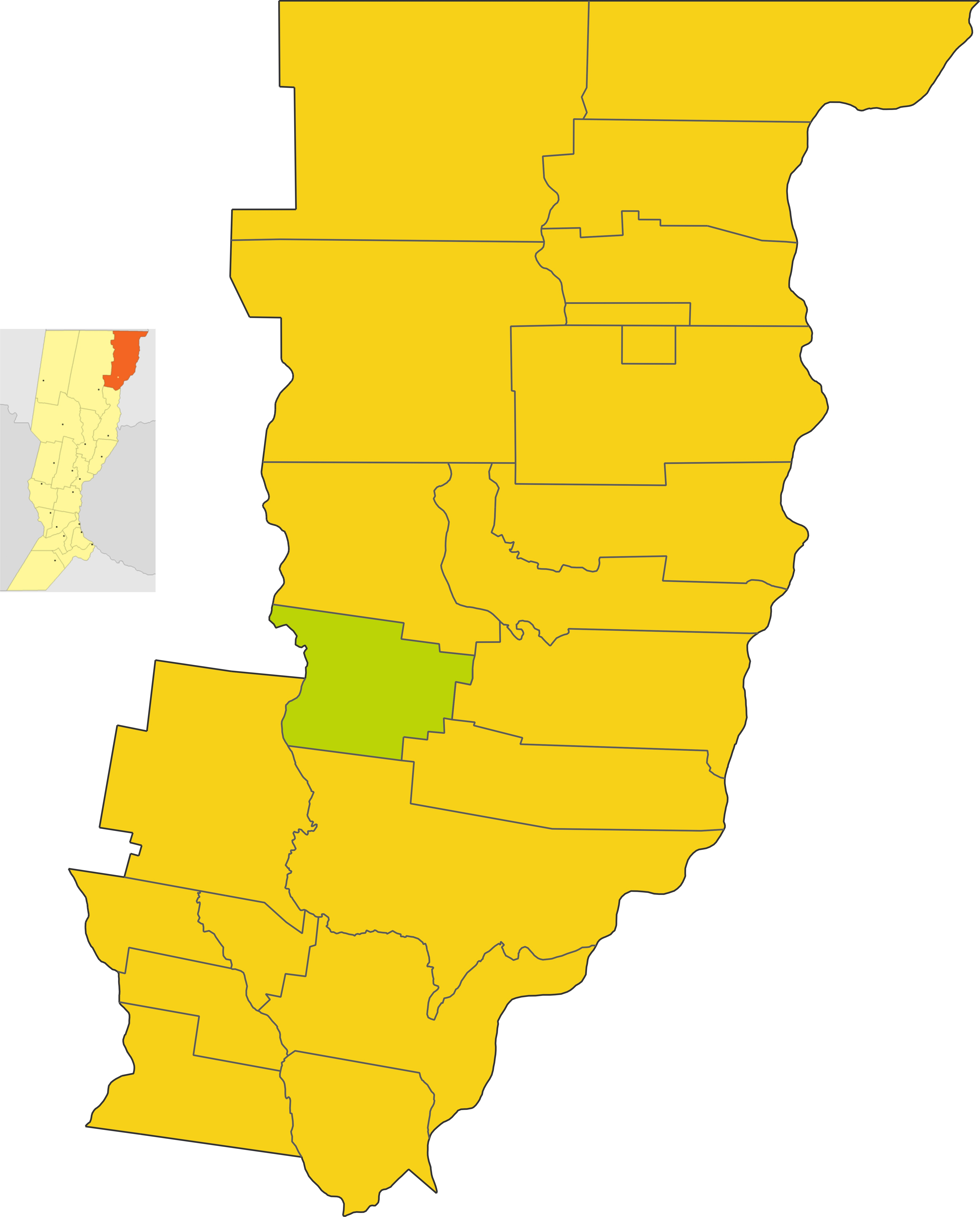 Map of the comuna de Lanteri in General Obligado department, Santa Fe province, Argentina